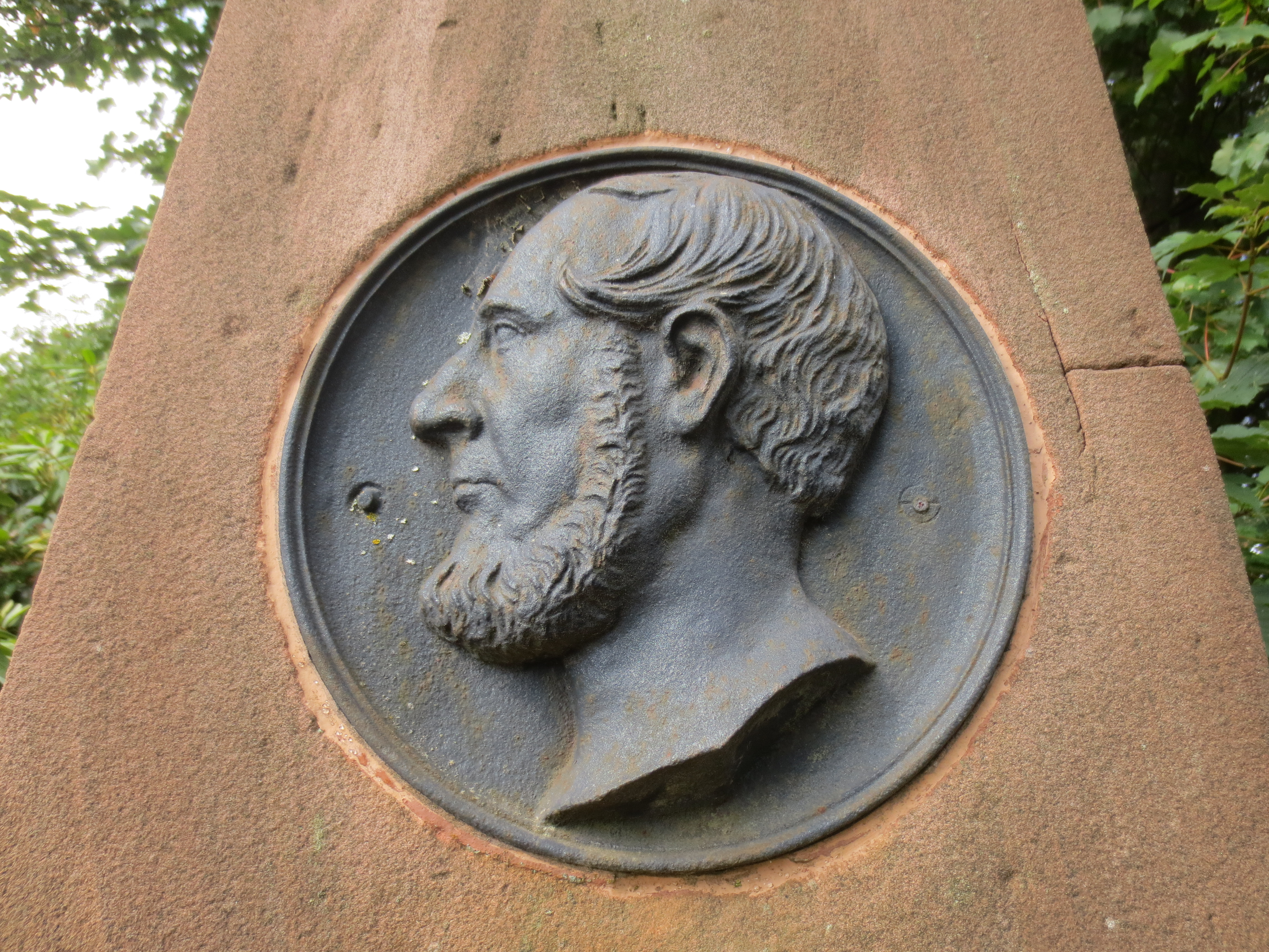 Profil des Vereinsgründers und 1. Vorsitzenden, Landrat Friedrich Wilhelm Groos (1804-1891)